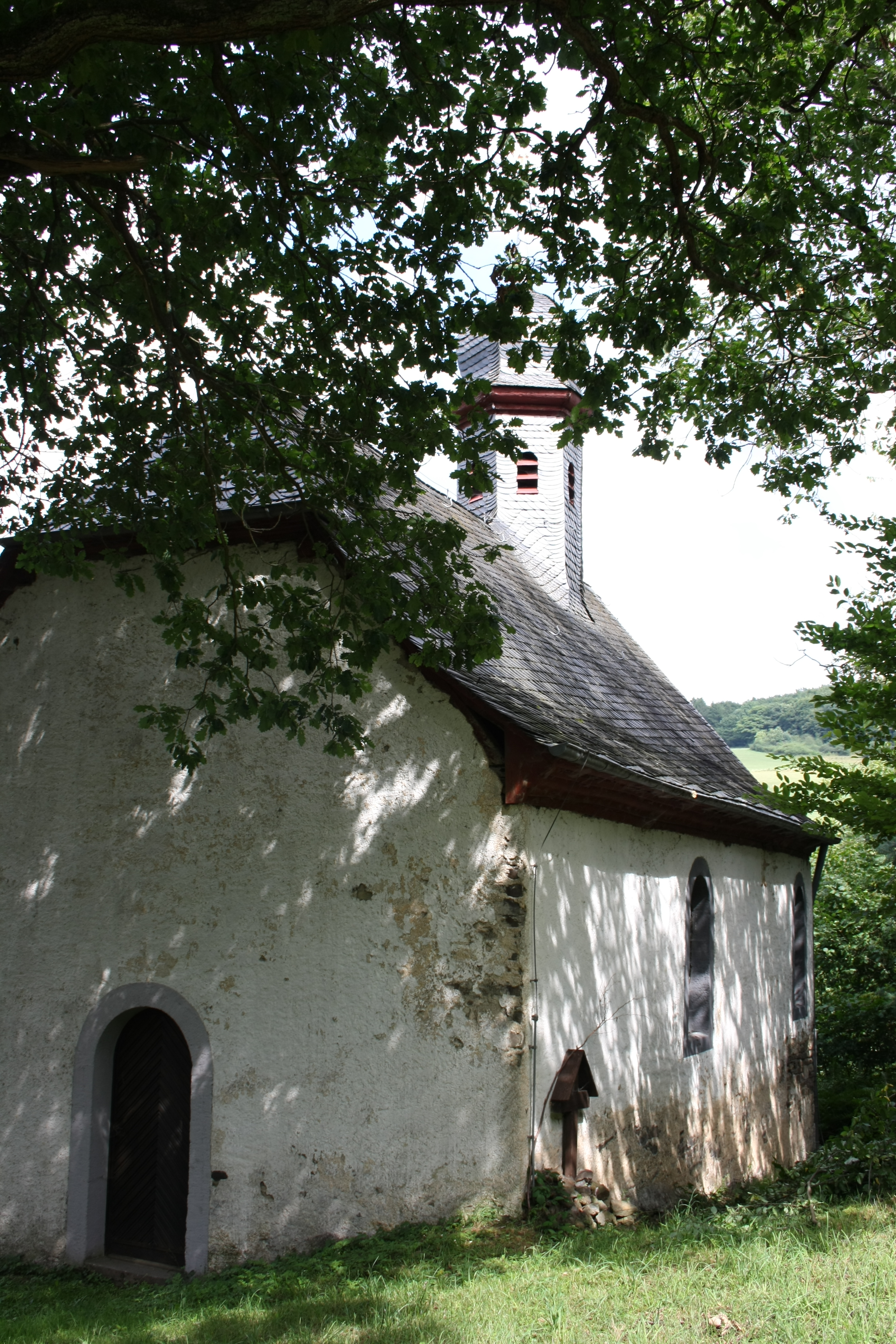 katholische Kapelle St. Michael in Oberheckenbach, Ortsteil von Heckenbach, 18. Jahrhundert